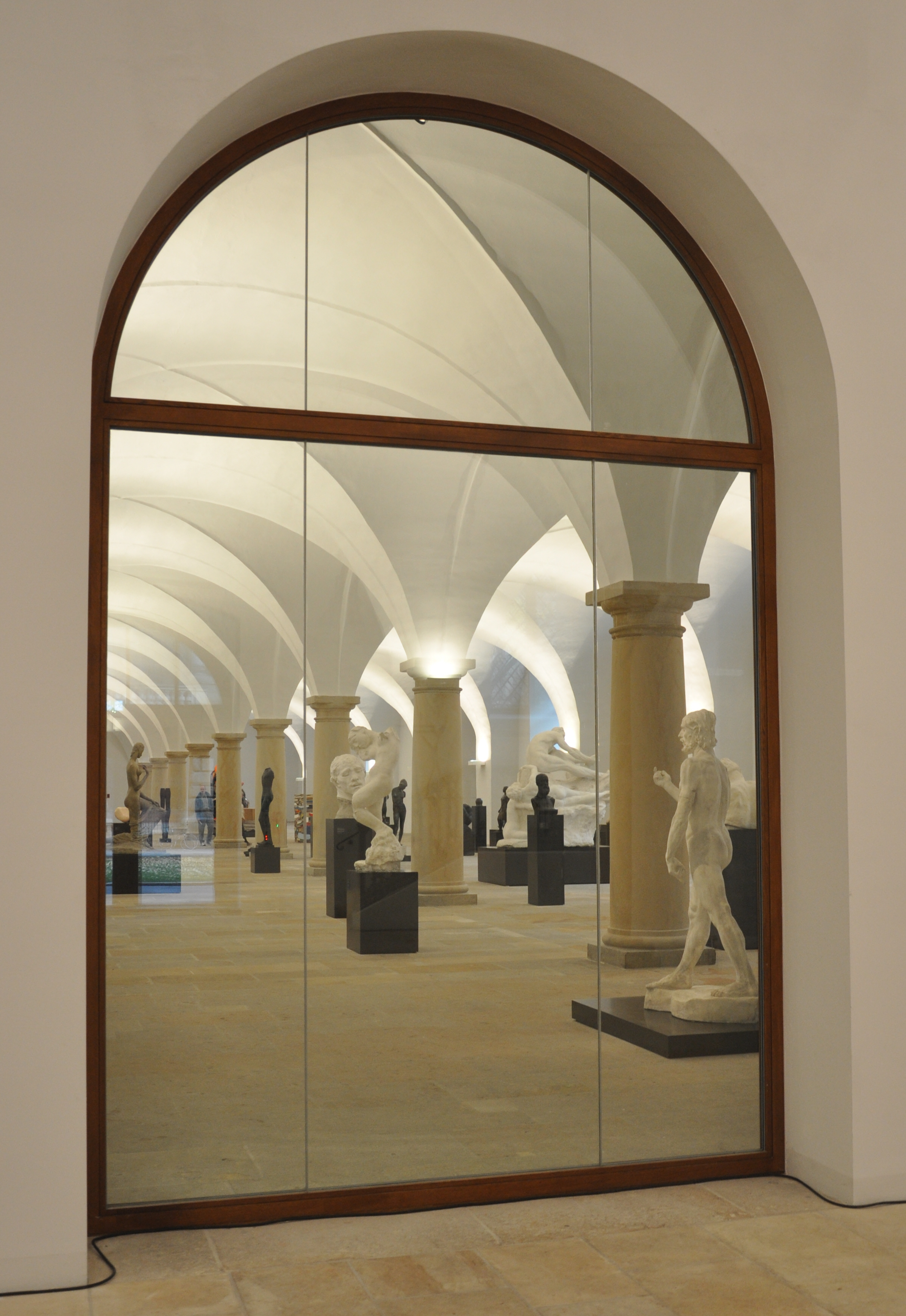 Dresden, Albertinum, Blick in die Skulpturenhalle